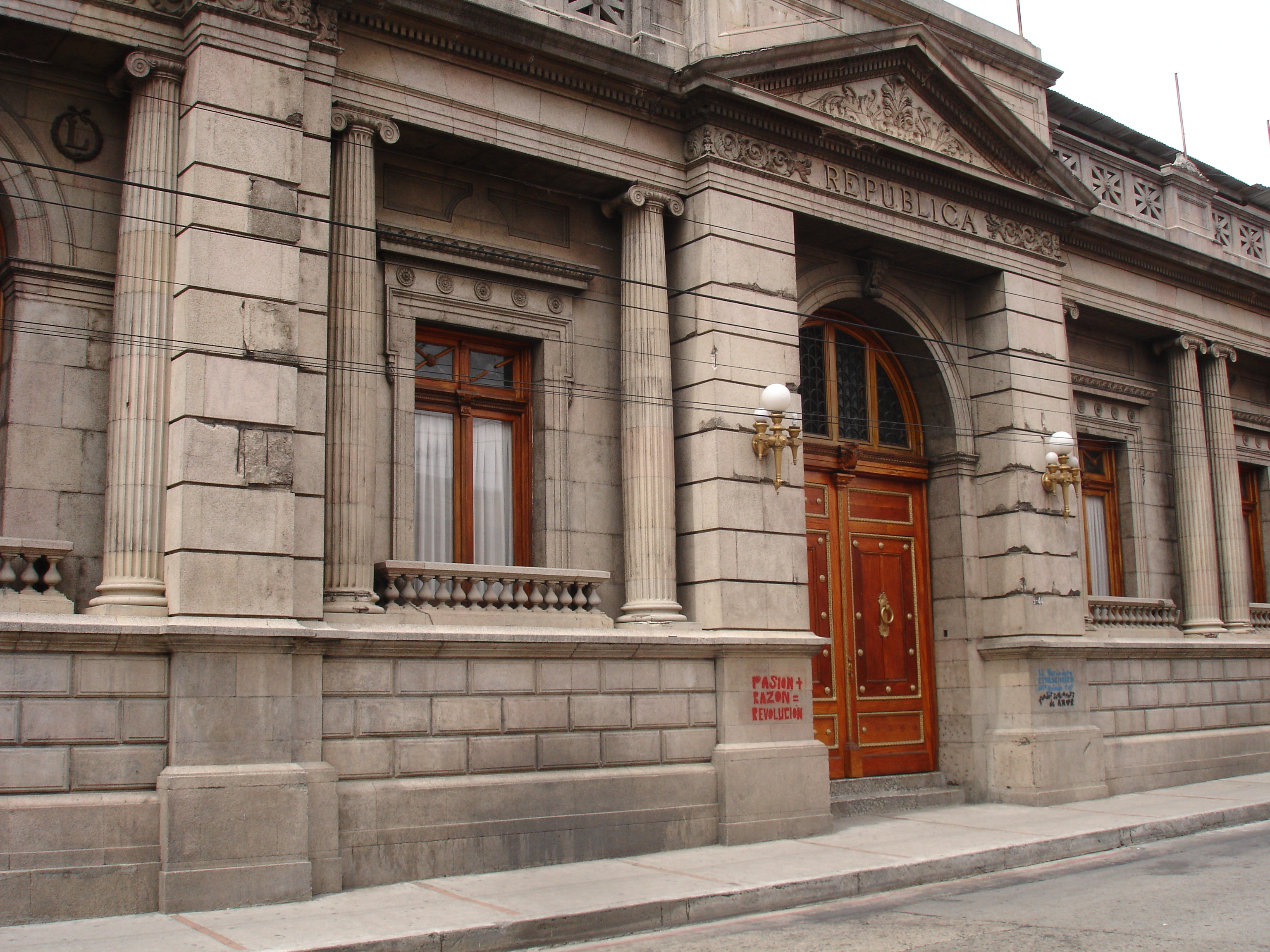 Ubicado en zona 1, Centro de Guatemala